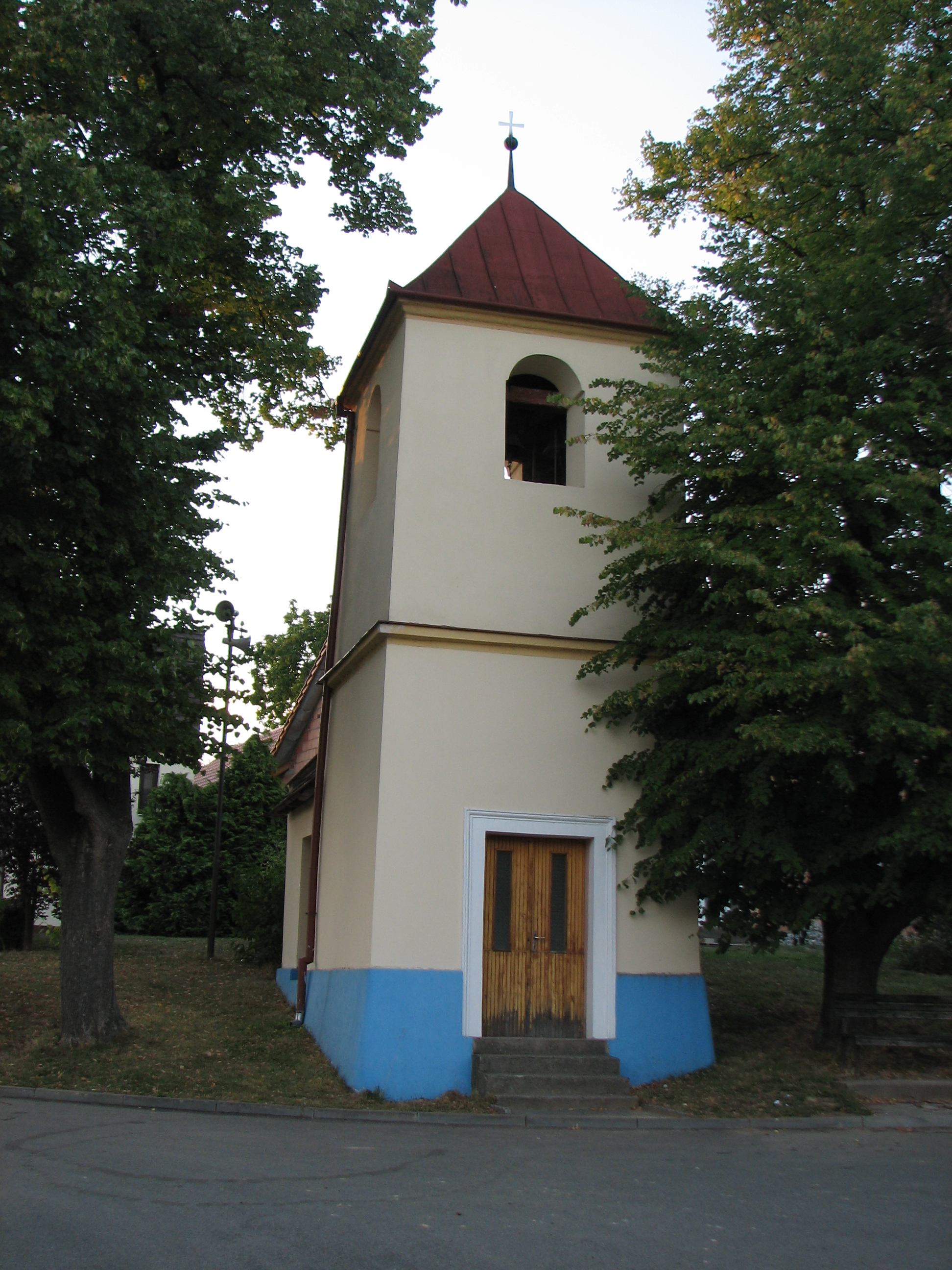 Moravany - zvonice na návsi z 18. století.